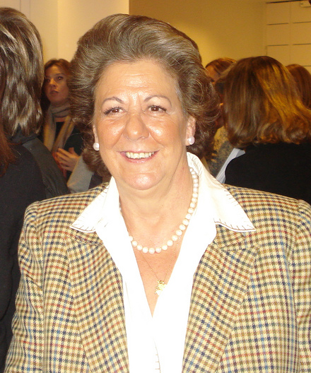 Rita Barbera en unas jornadas del PP contra la violencia de género en Valencia, diciembre de 2008.